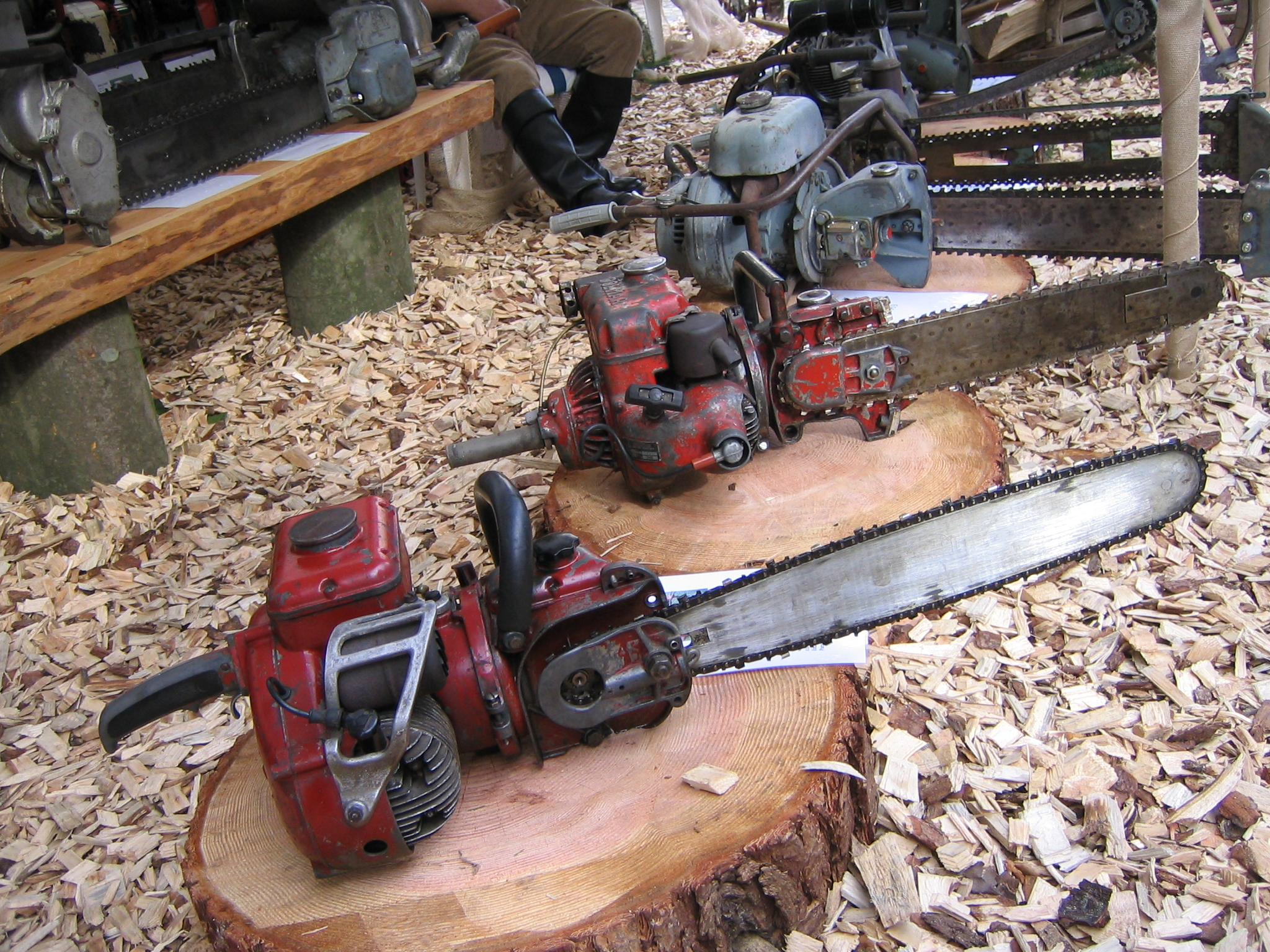 Dolmar-Kettensägen auf dem Festival Staufen Stages am Stand der Klaus Bärmann GmbH